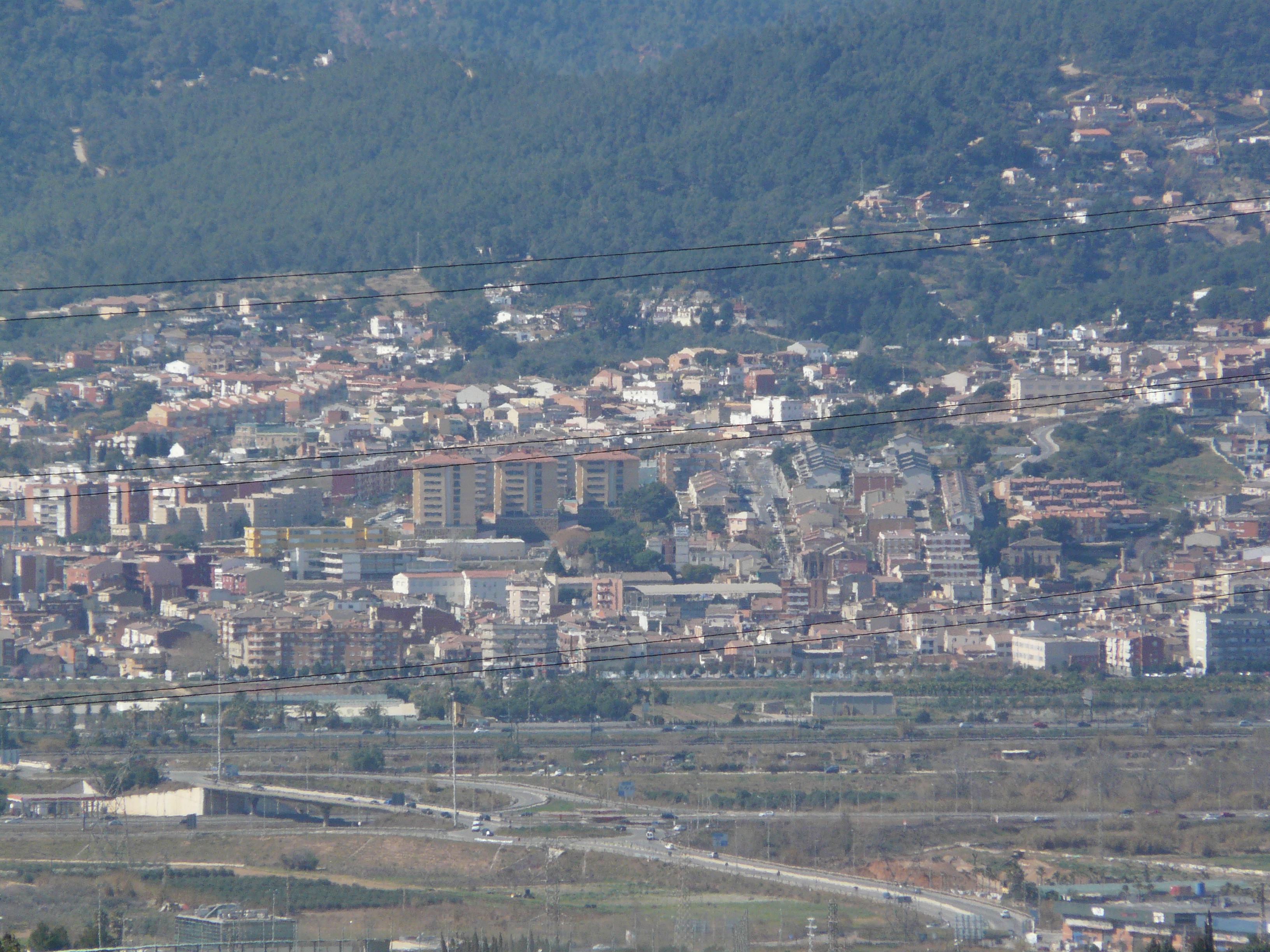 Església parroquial de Sant Vicenç (Sant Vicenç dels Horts) Object location41° 23′ 34.23″ N, 2° 00′ 39.07″ E